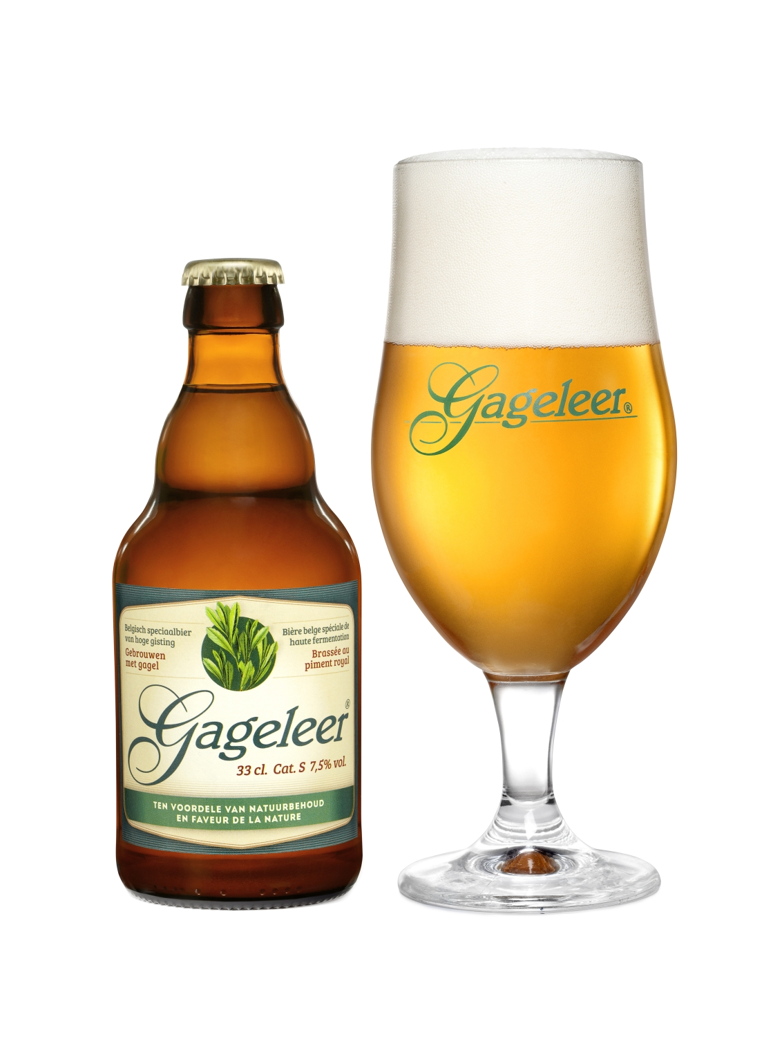 Gageleer 33 cl en glas